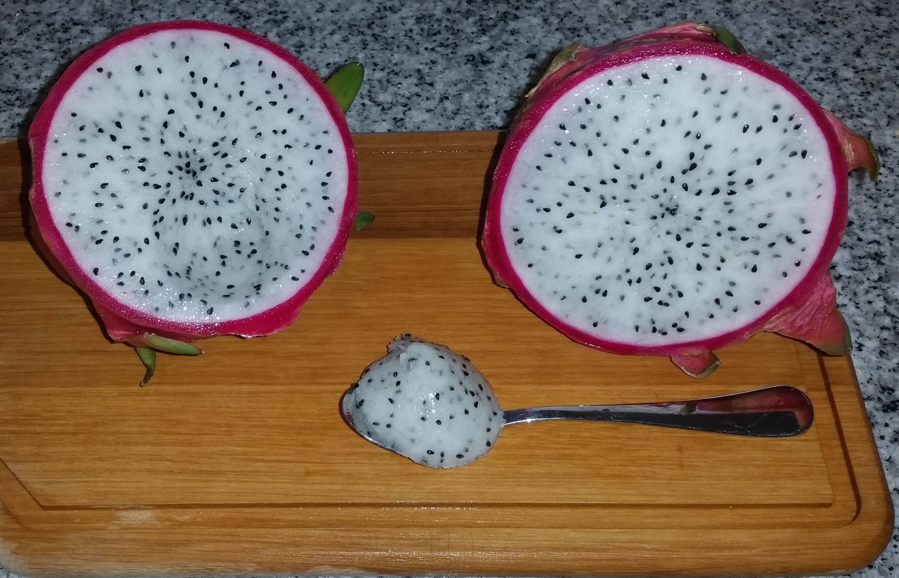 Pitahaya roja partida, con la pulpa expuesta para observar su consistencia suave, pero firme.